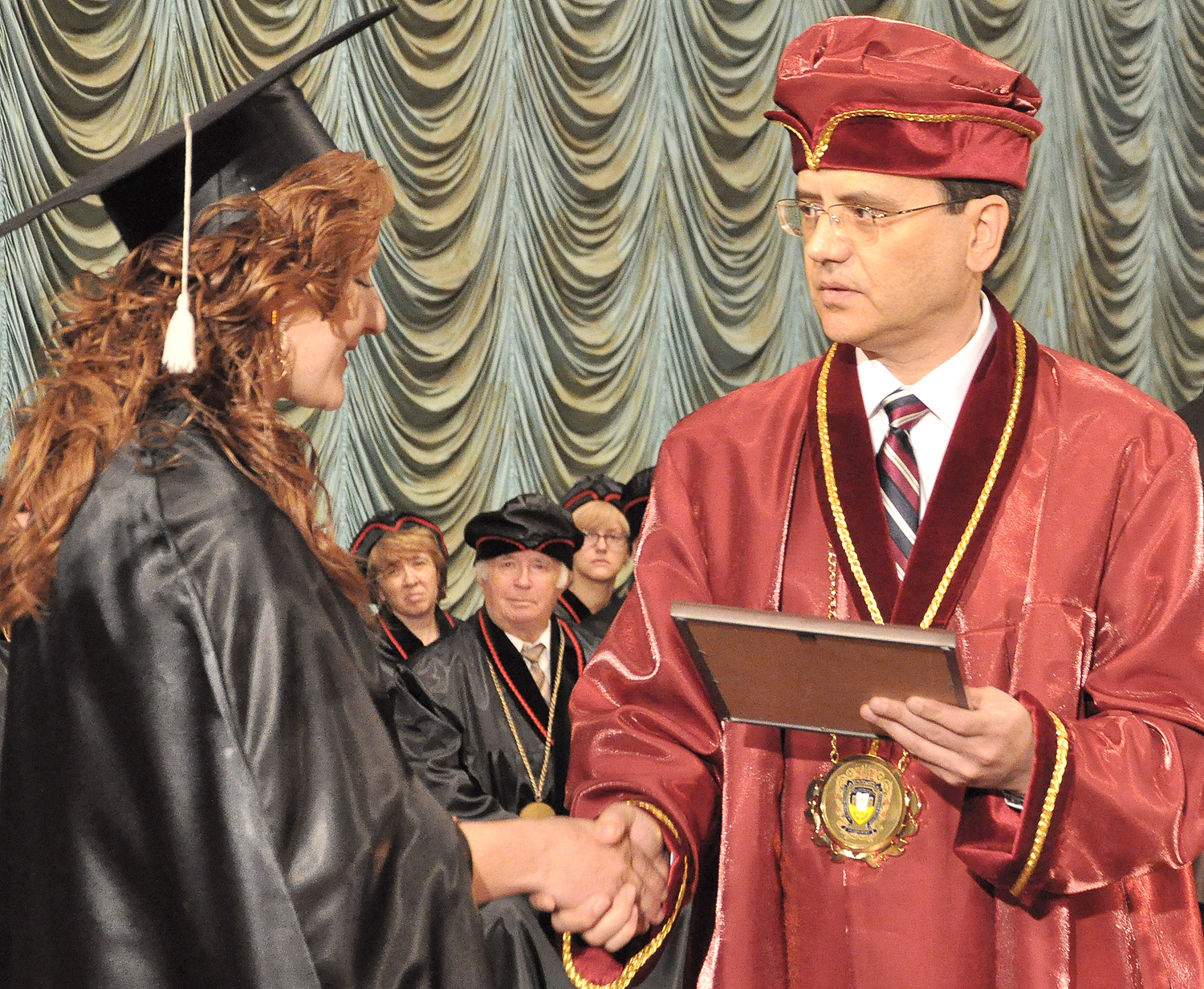 Ректор ТДМУ Михайло Корда вручає диплом випускниці медичного факультету, лікарю-волонтеру АТО Іванні Чобанюк (25 червня 2015 року, ПК «Березіль»).